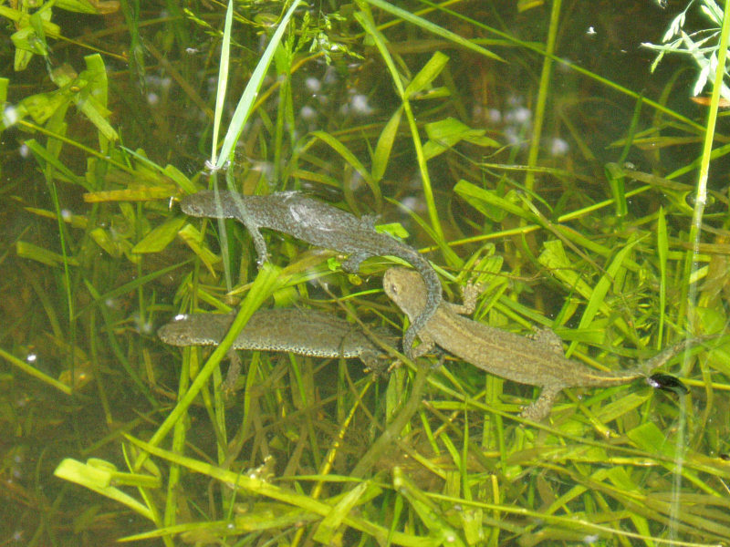 Triturus alpestris